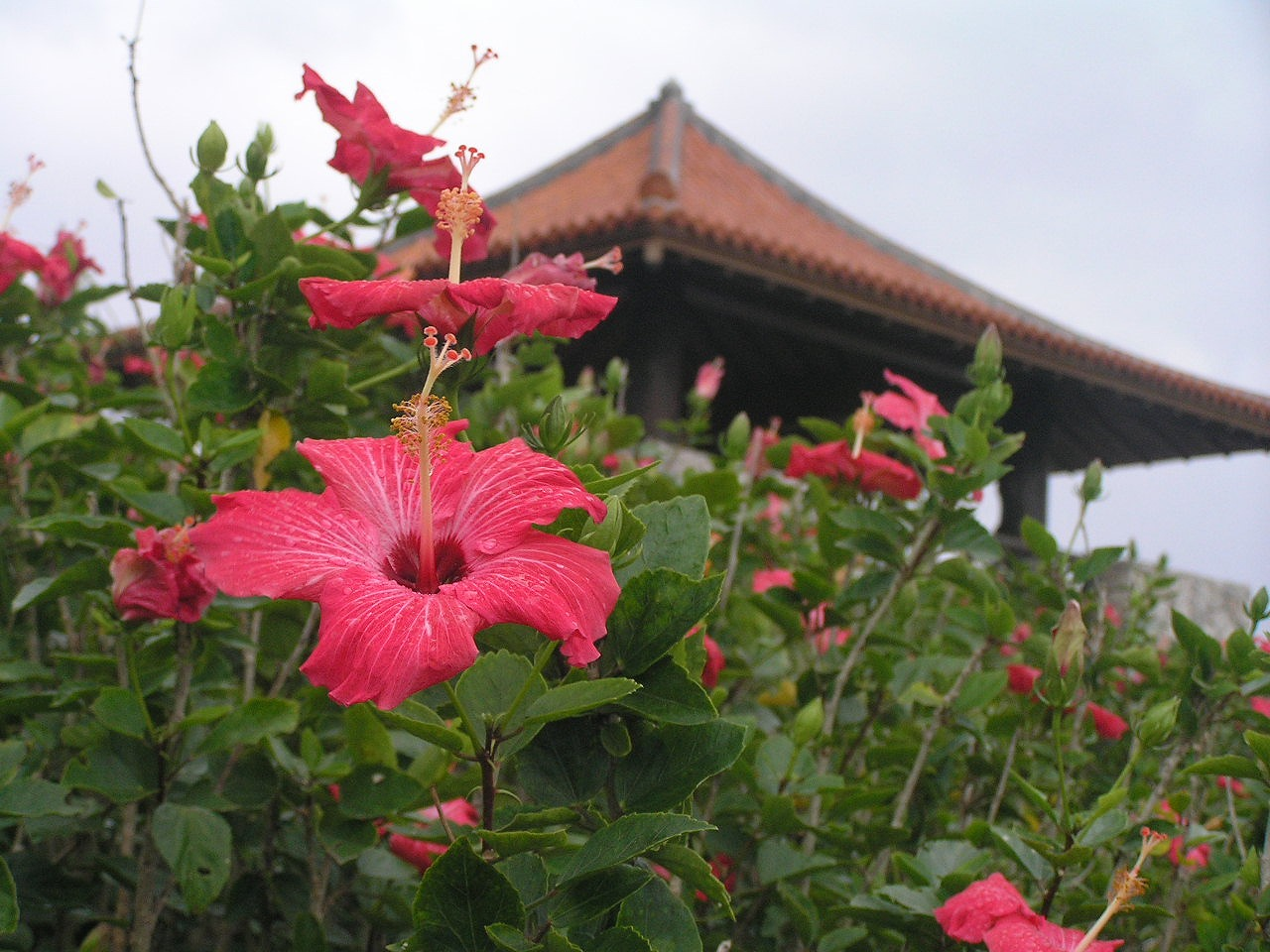 石垣島・玉取崎にて撮影されたハイビスカス